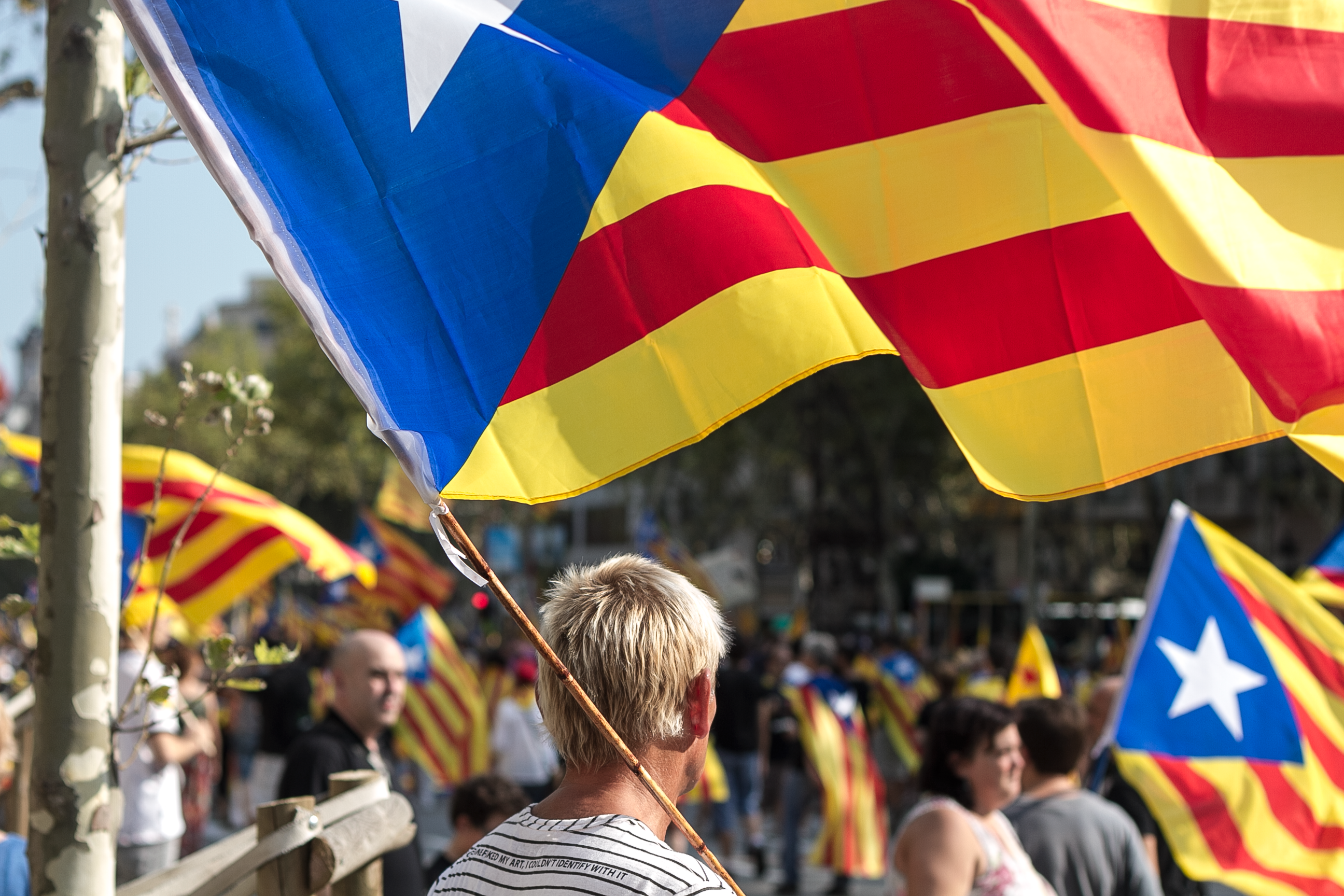 2012 Catalan independence protest